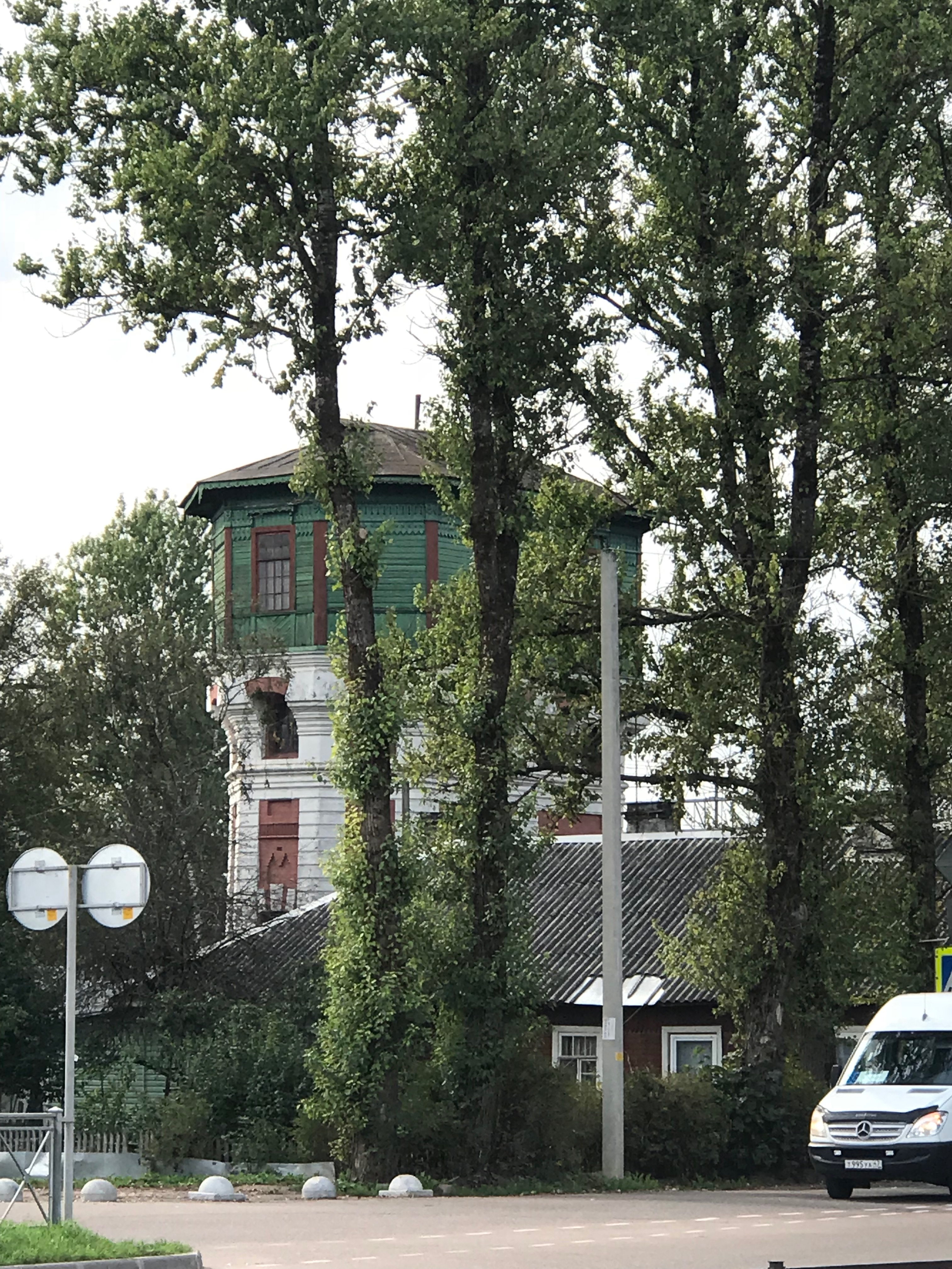 Волосово